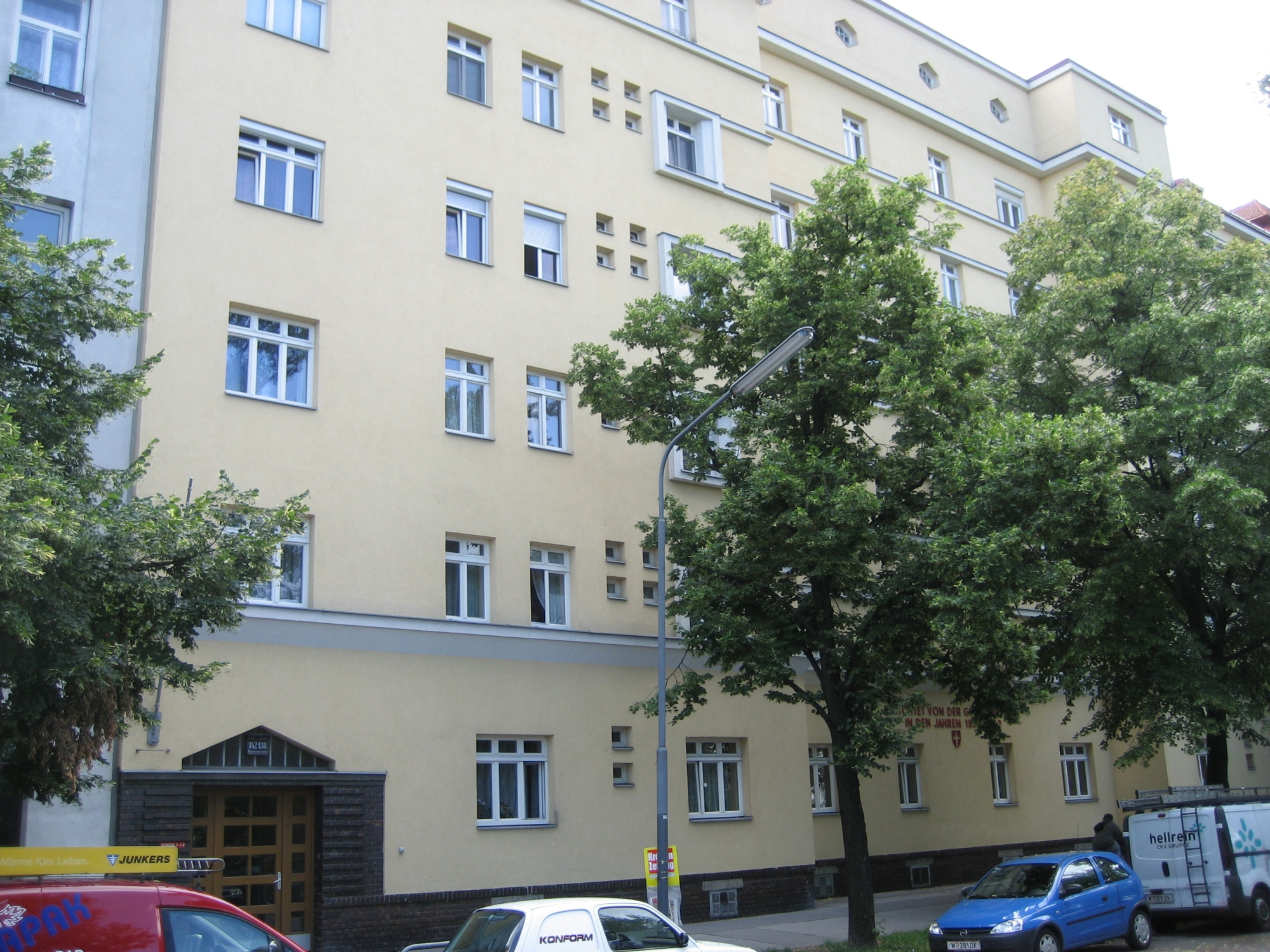 Haus Brigittenauer Lände 138-142 in der Brigittenau, in Wien This media shows the Vienna residential building (Gemeindebau) with the ID 1411.